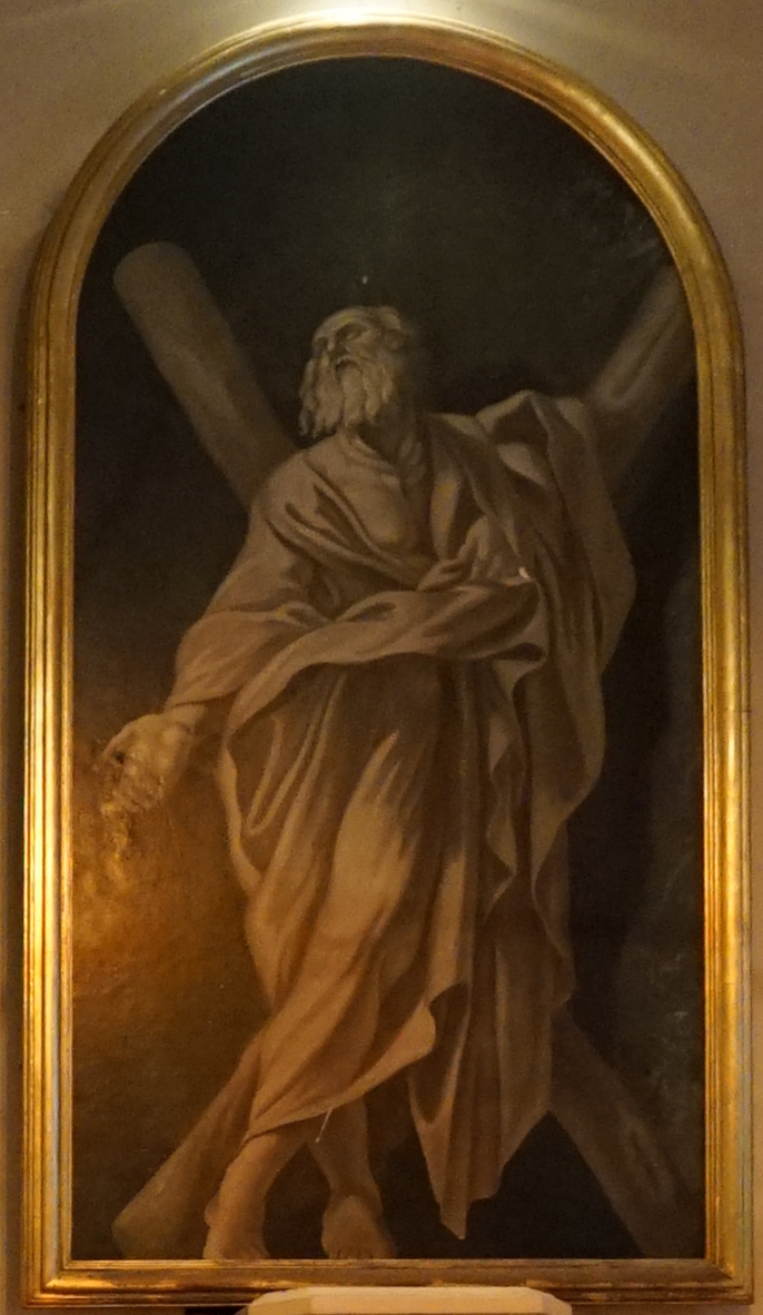 à l'intérieur de l'église.